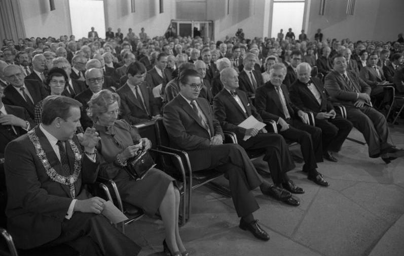 Verleihung des Friedenspreises des Deutschen Buchhandels für 1982 an den amerikanischen Diplomaten und Historiker George F. Kennan in der Frankfurter Paulskirche.